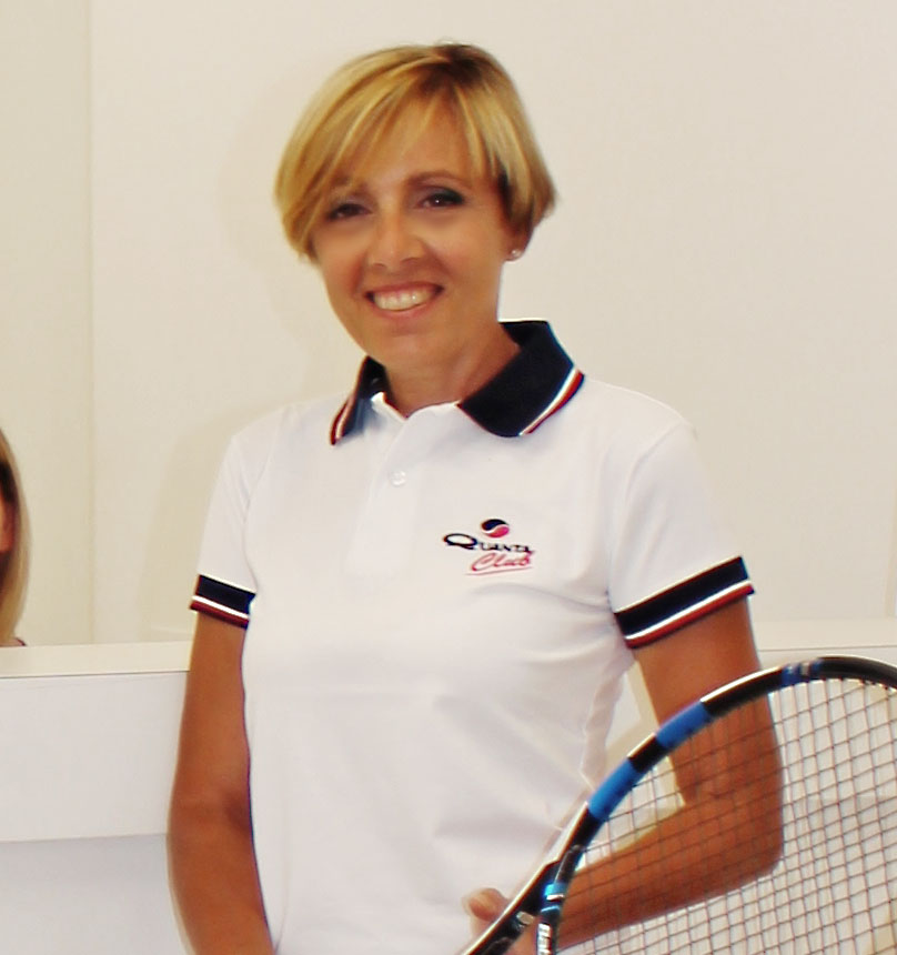 Barbara Rossi